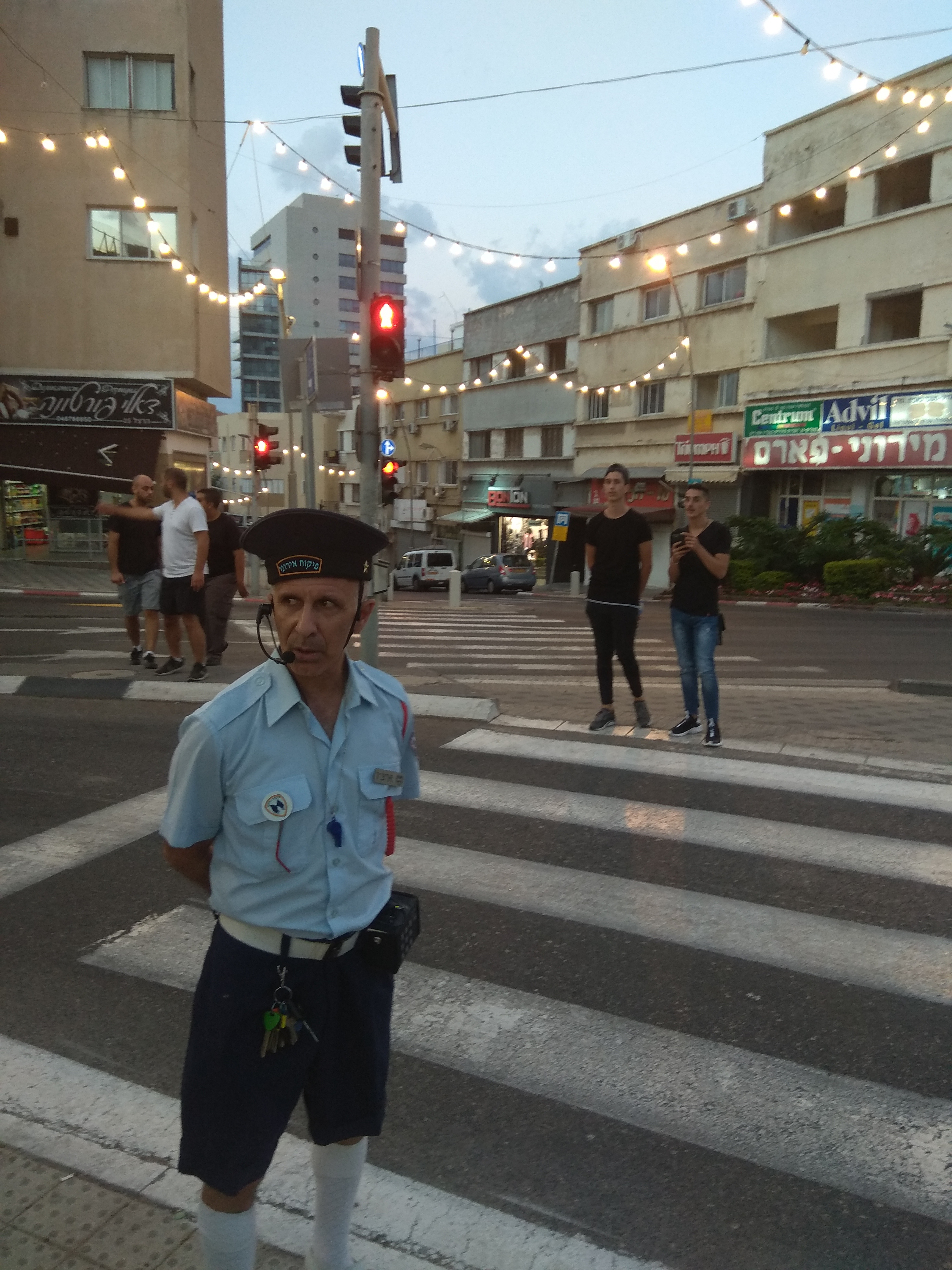 יוסי רחמני במופע הרחוב "פיקוח אירוני" בחיפה